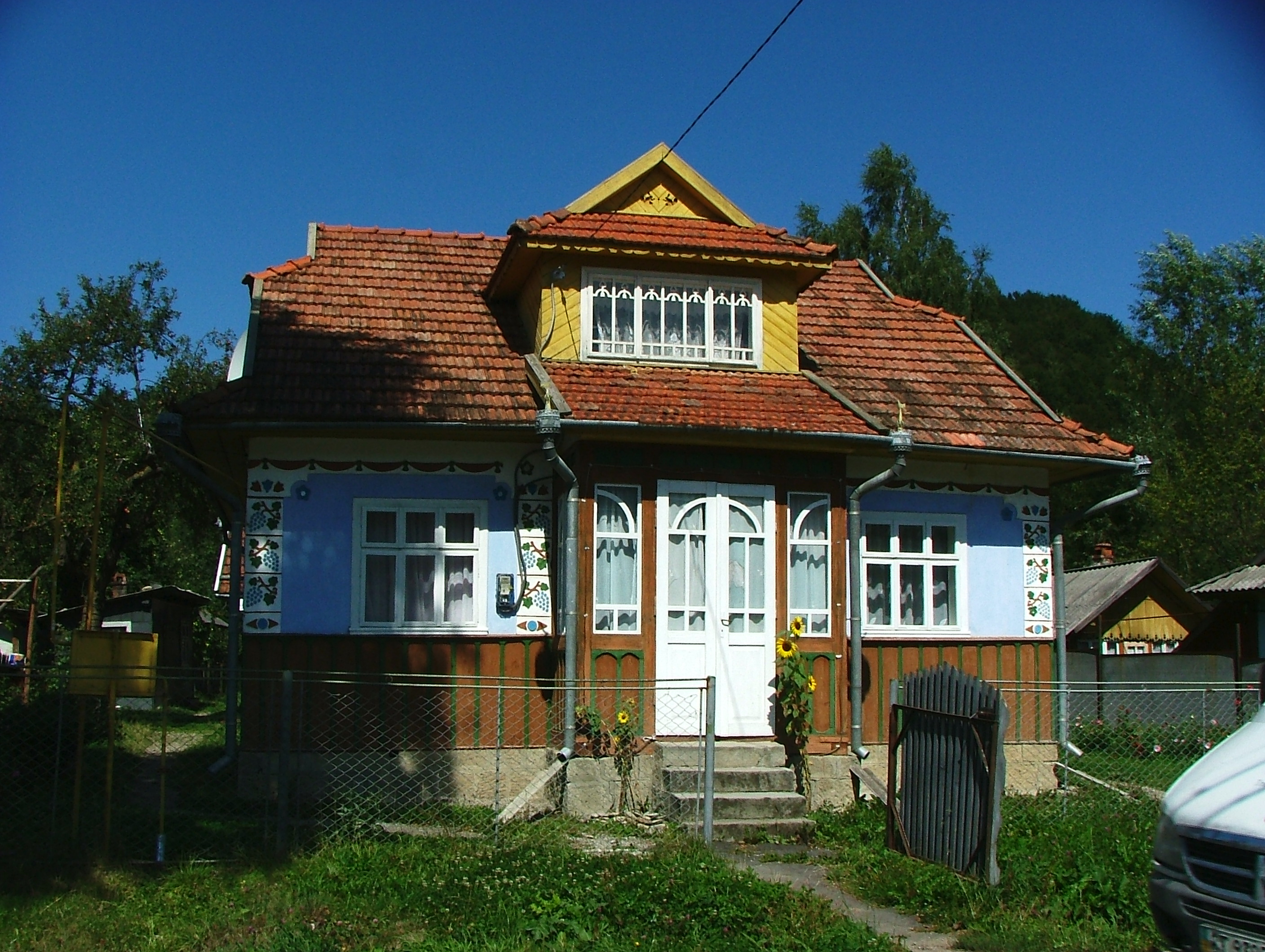 село Шешори (Косівський район)